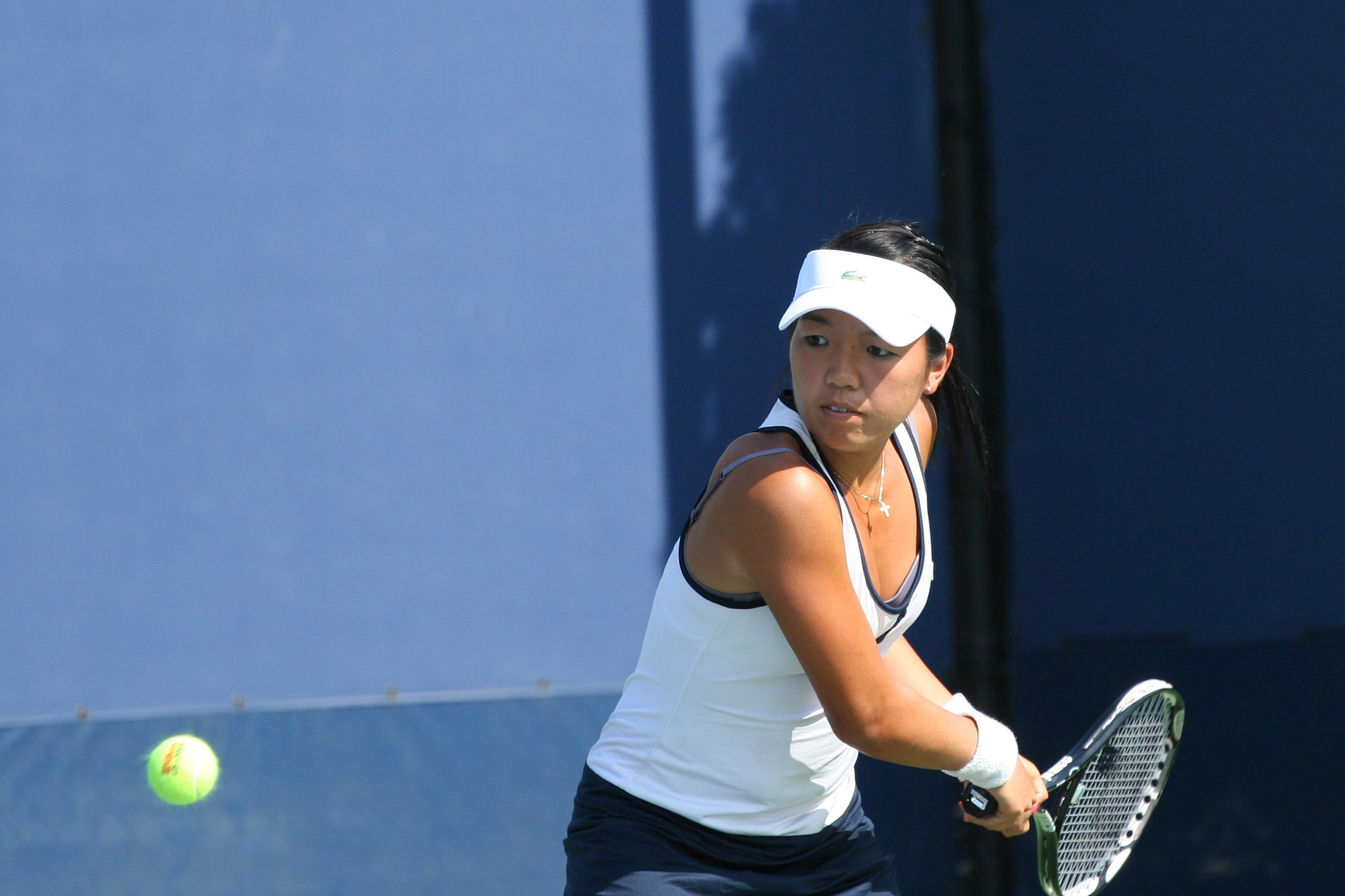 U.S. Open Saturday, Sept. 5, 2009